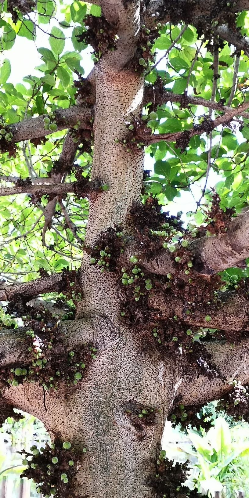 Ficus sycomorus – Stamm & Früchte. Februar 2020. Location: Palmetum, Santa Cruz de Tenerife, Canary Islands, Spain: 28,452, -16,257